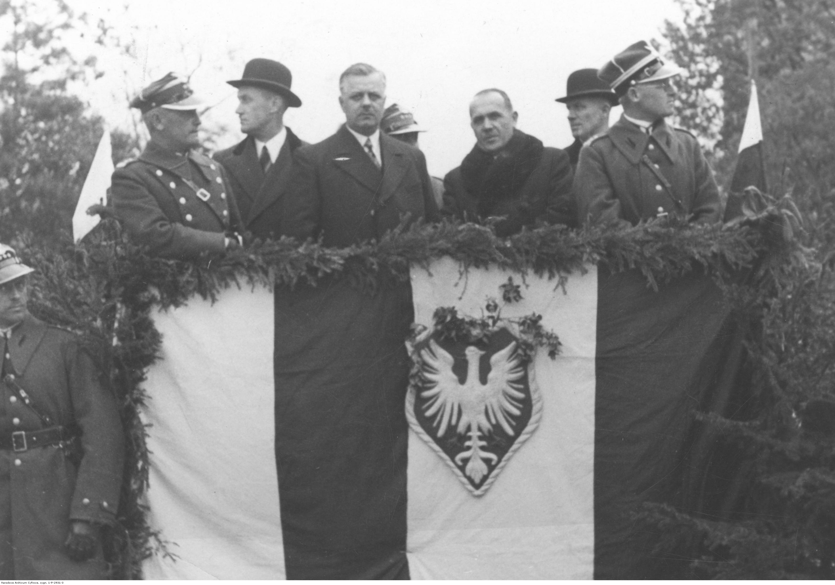 Święto Narodowe Trzeciego Maja – uroczystości w Rzeszowie. Trybuna honorowa podczas defilady. Na trybunie od lewej: dowódca 17 Pułku Piechoty ppłk Stanisław Siuda, prokurator J. Dobrzyński, starosta rzeszowski Marian Panglisz, prezydent Rzeszowa Jan Niemierski, NN, dowódca 10 Dywizjonu Artylerii Konnej ppłk Jan Woźniakowski. Koncern Ilustrowany Kurier Codzienny - Archiwum Ilustracji. Sygnatura: 1-P-2931-3